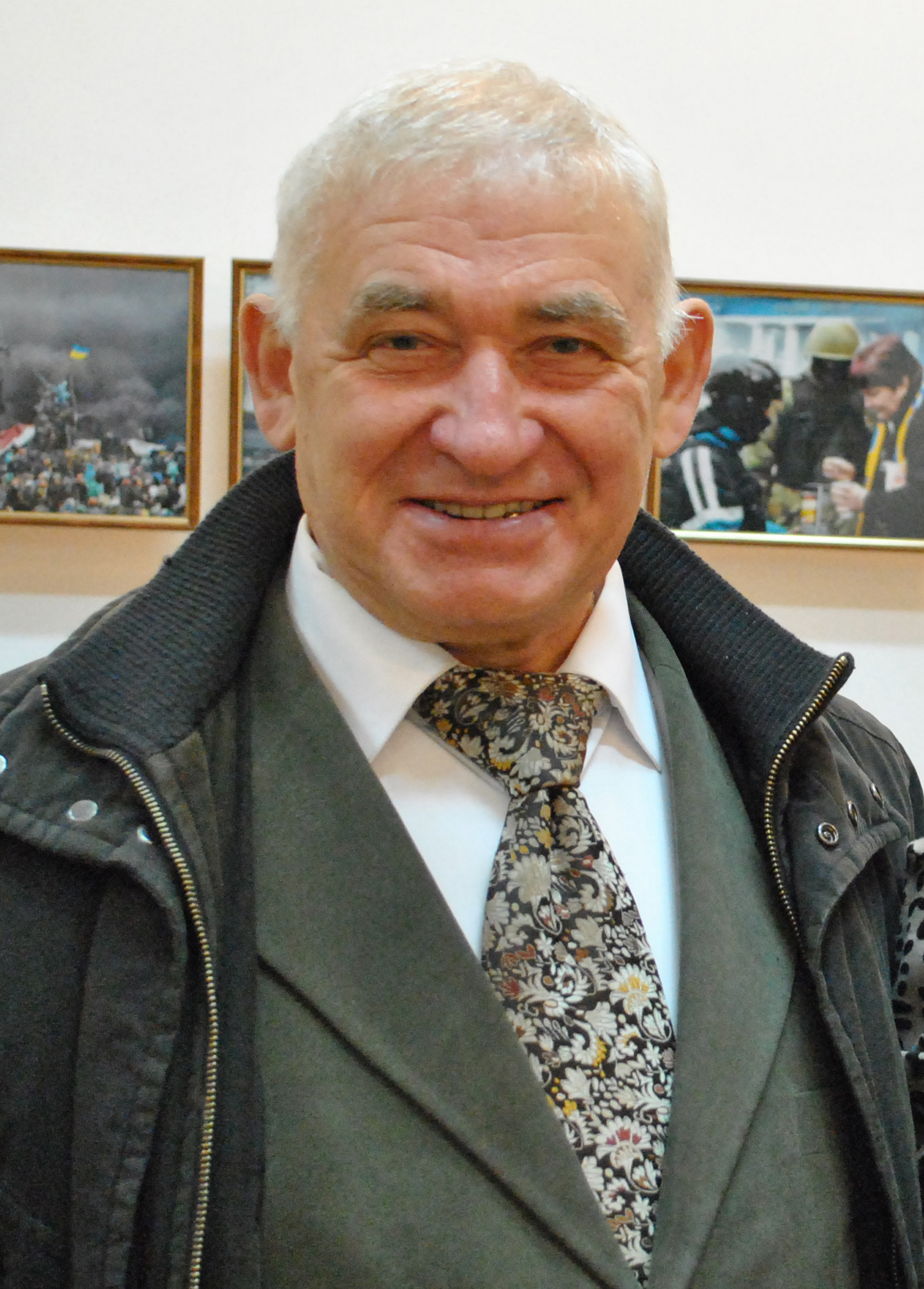 Український громадсько-політичний діяч, публіцист, літературознавець, педагог, народний депутат України 1-го скликання (від 1990), депутат Тернопільської міської ради (1990), Тернопільської обласної ради 2-го скликання (1994) Володимир Володимирович Колінець.